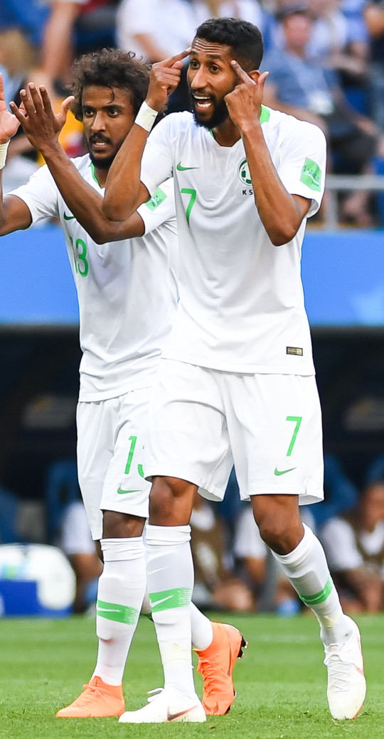 Гол Суареса на «Ростов Арене» вывел Уругвай в плей-офф чемпионата мира